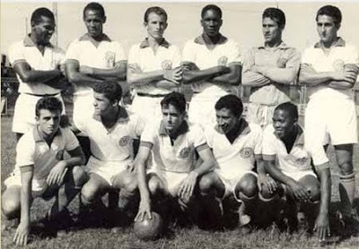 Elenco de 1963 - Walter; Julião Odorico e Salvador; Nestor e Paulinho; Raimundinho, Cabralzinho, Picolé, Bazzaninho e Paraná